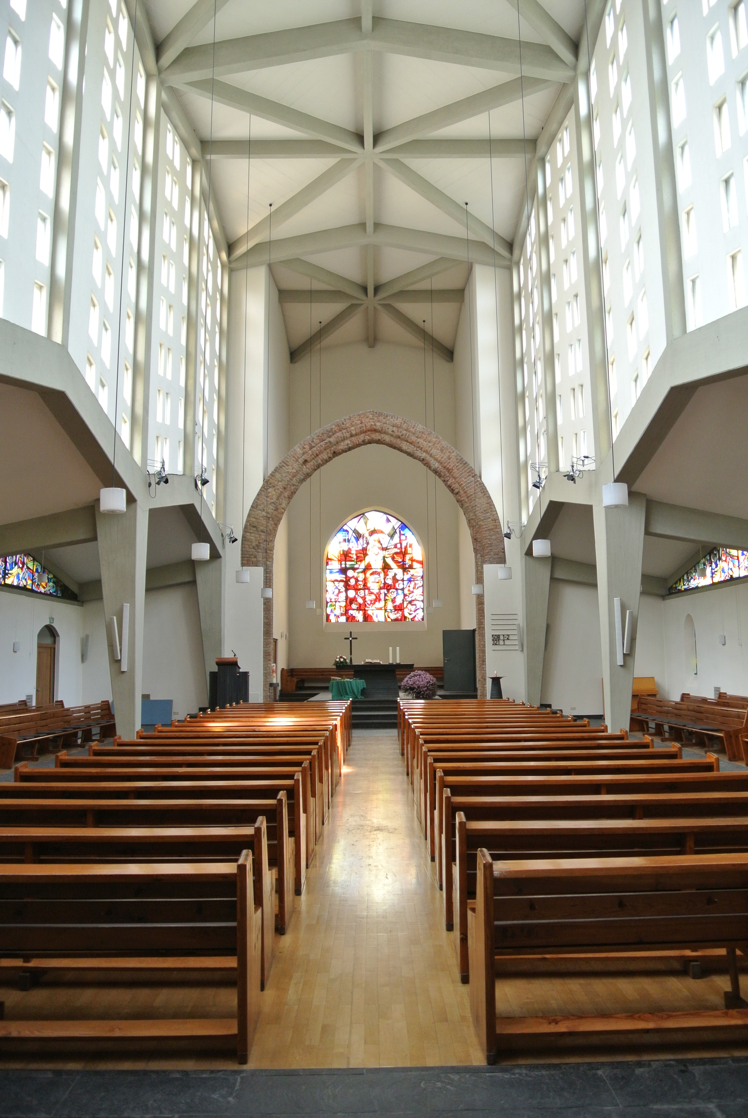 Epiphaniaskirche Innenraum, eine Kirche aus den 1950er Jahren des Architekten Karl Wimmenauer unter Verwendung der Ruine der Immanuelkirche von 1903